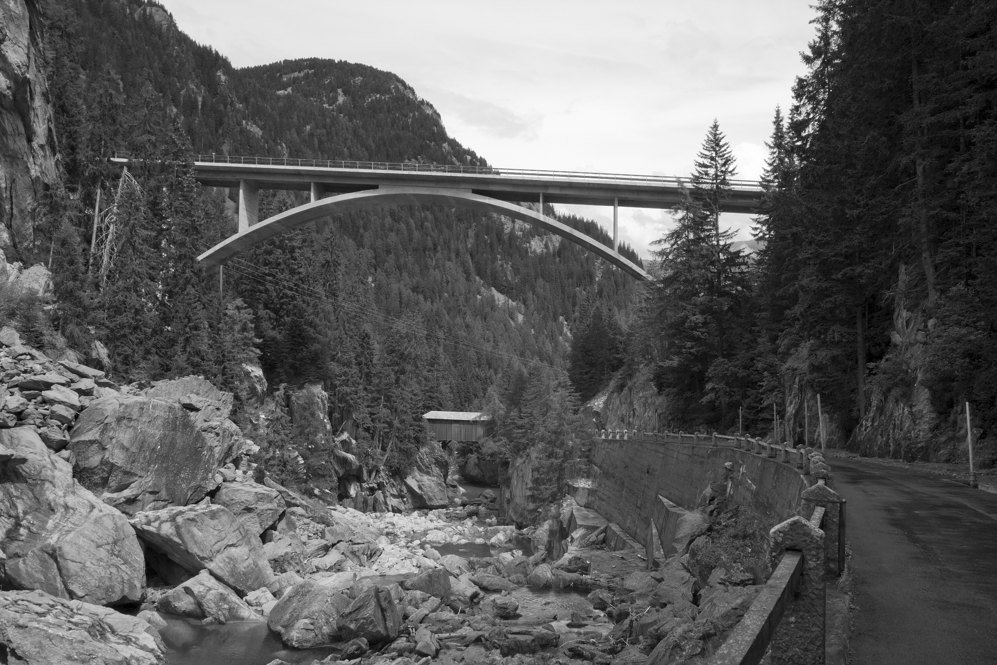 Hinterrheinbrücke Crestawald von Christian Menn